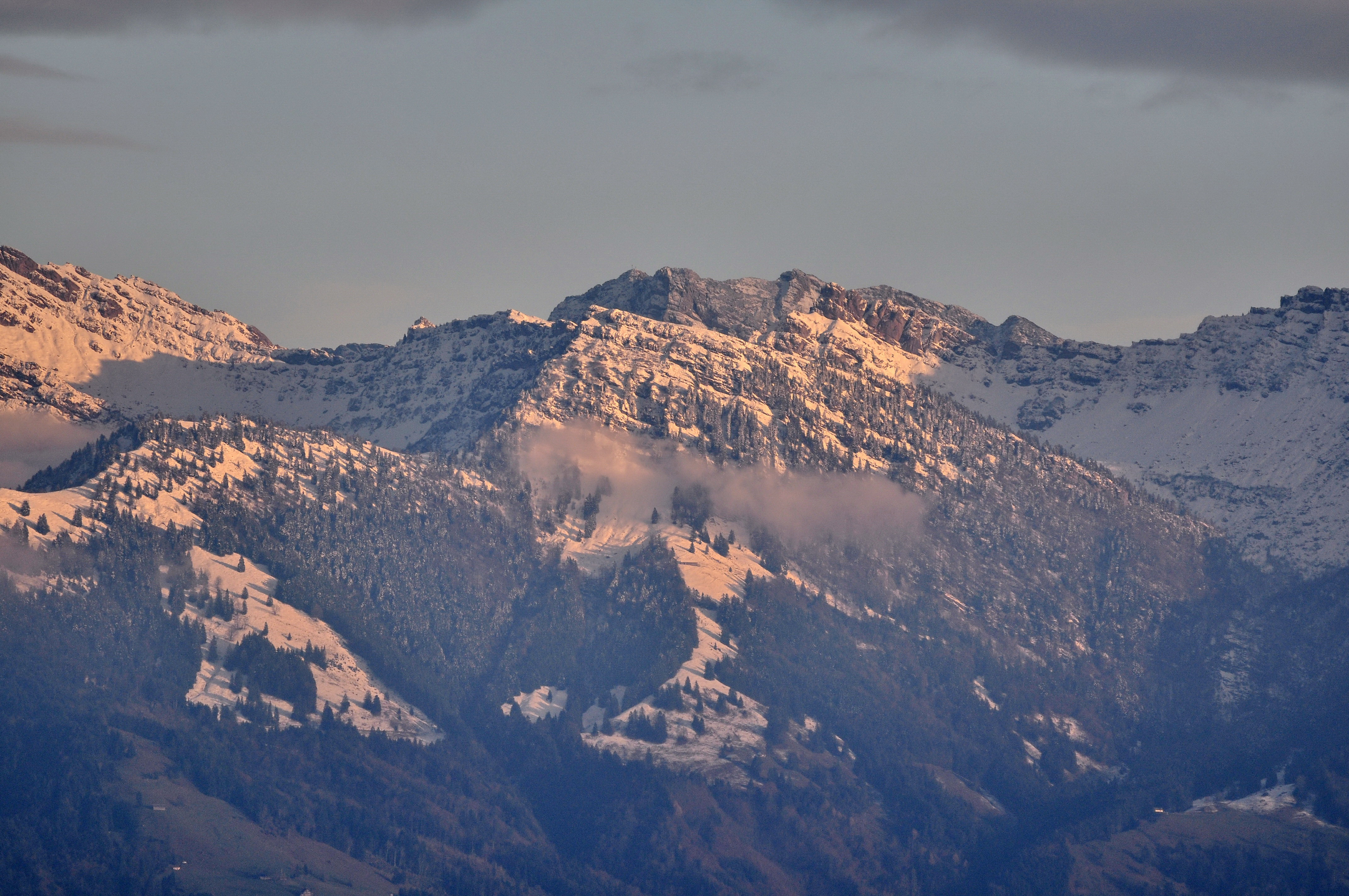 Chüemettler as seen from Kempraten (Switzerland)